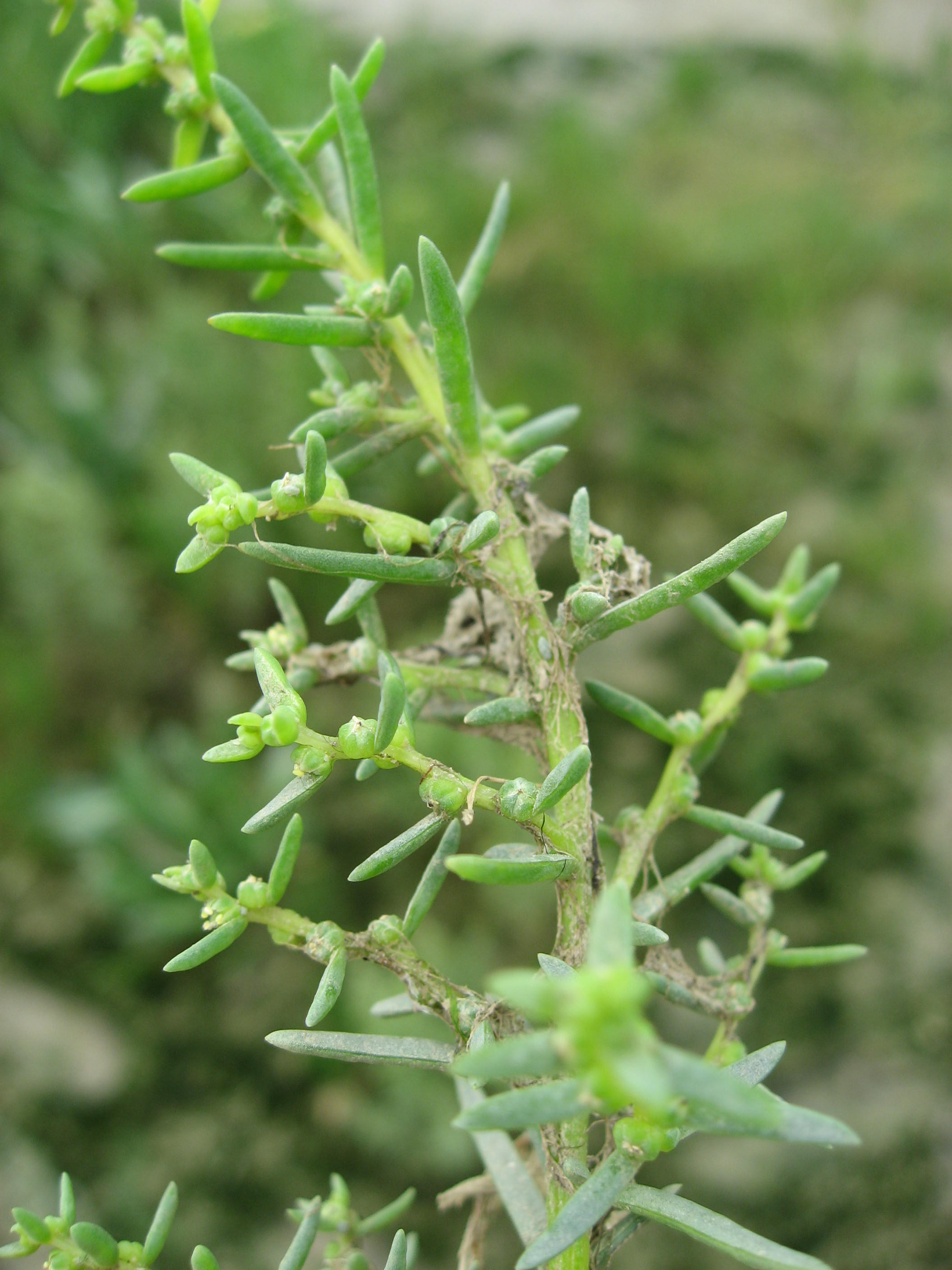 Soude Maritime (Suaeda maritima) in Baie de Somme Map: 50° 11' 40" N 1° 38' 54" E